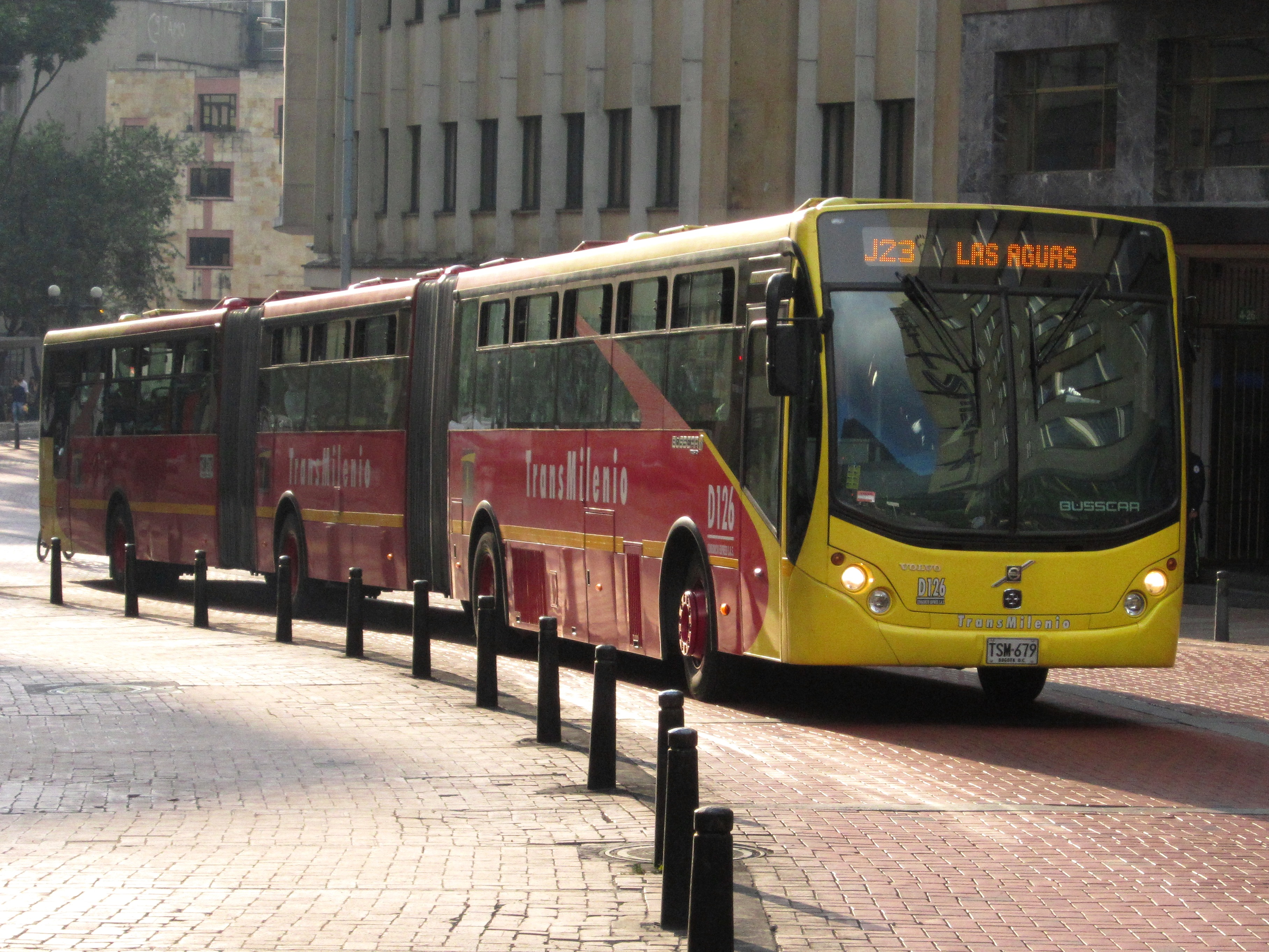 Bus de Transmilenio entre las carreras 5 y 6 en la av. Jiménez de Bogotá.